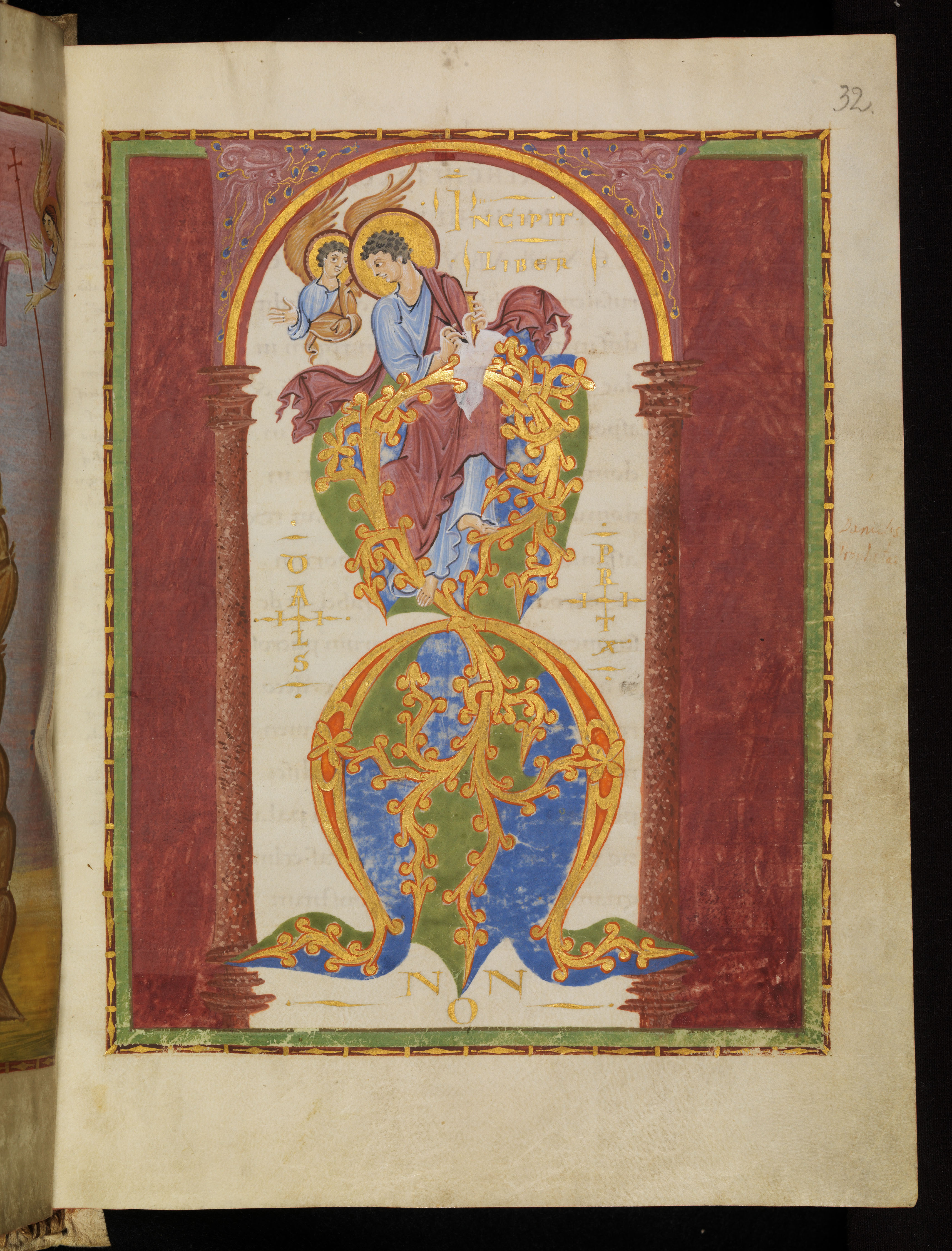 Bamberger Kommentar (Bamberg, Staatsbibliothek, Msc. Bibl. 22), fol. 32r. Der Prophet Daniel aus A-Initiale